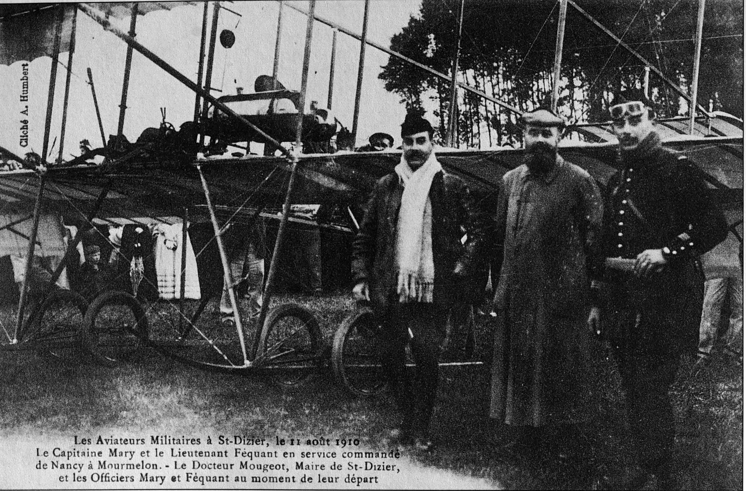 vue ancienne de la commune.